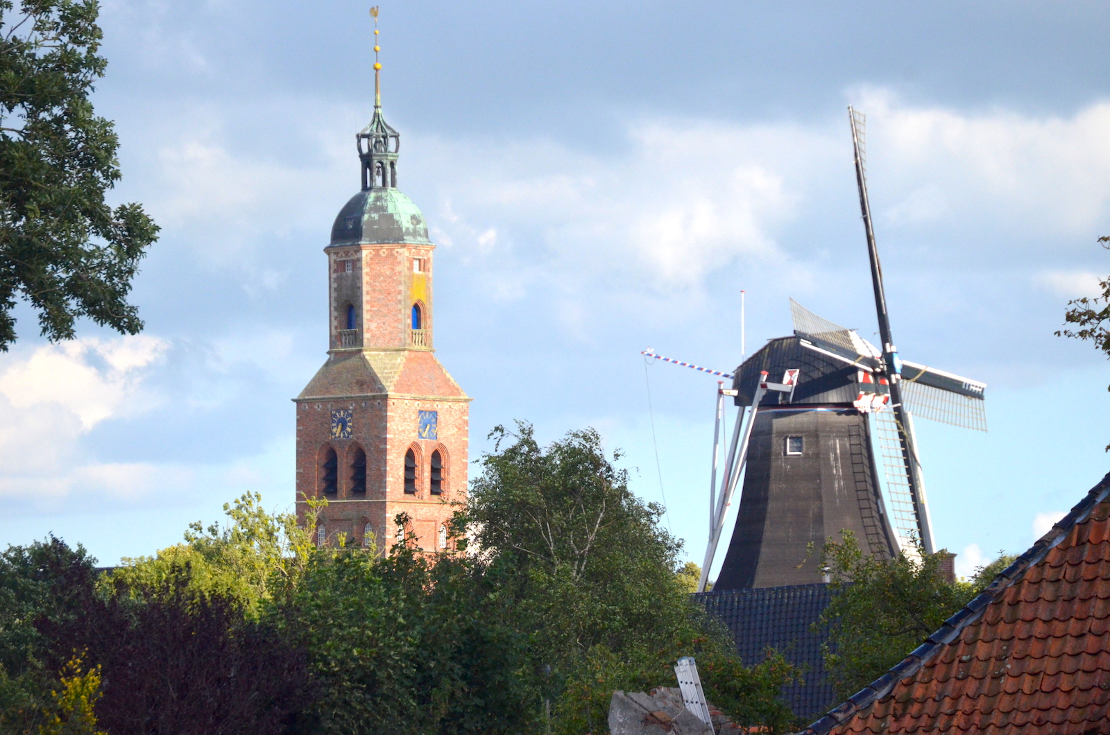 Zicht op Kerktoren en Molen te Eenrum. Foto: Erik Swierstra.